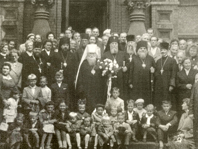 Delegacja Rosyjskiego Kościoła Prawosławnego w Warszawie, 1959: metropolita leningradzki Pitirim, biskup bobrujski Leoncjusz oraz biskup lwowski Palladiusz.